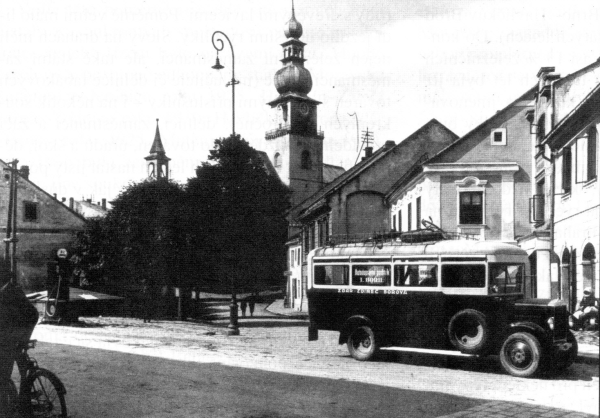 Autobusová zastávka ve Žďáru nad Sázavou (tehdy Město Žďár) na dnešním Havlíčkově náměstí kolem roku 1930.